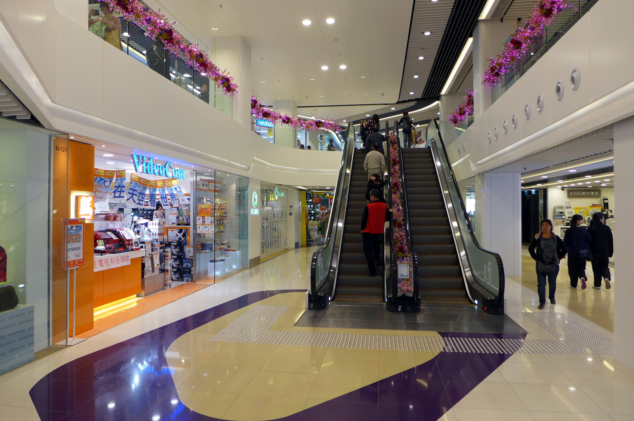 HANDS Zone N